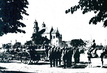 Przed defiladą 15 sierpnia 1939 w Wilnie [opis oryginalny]